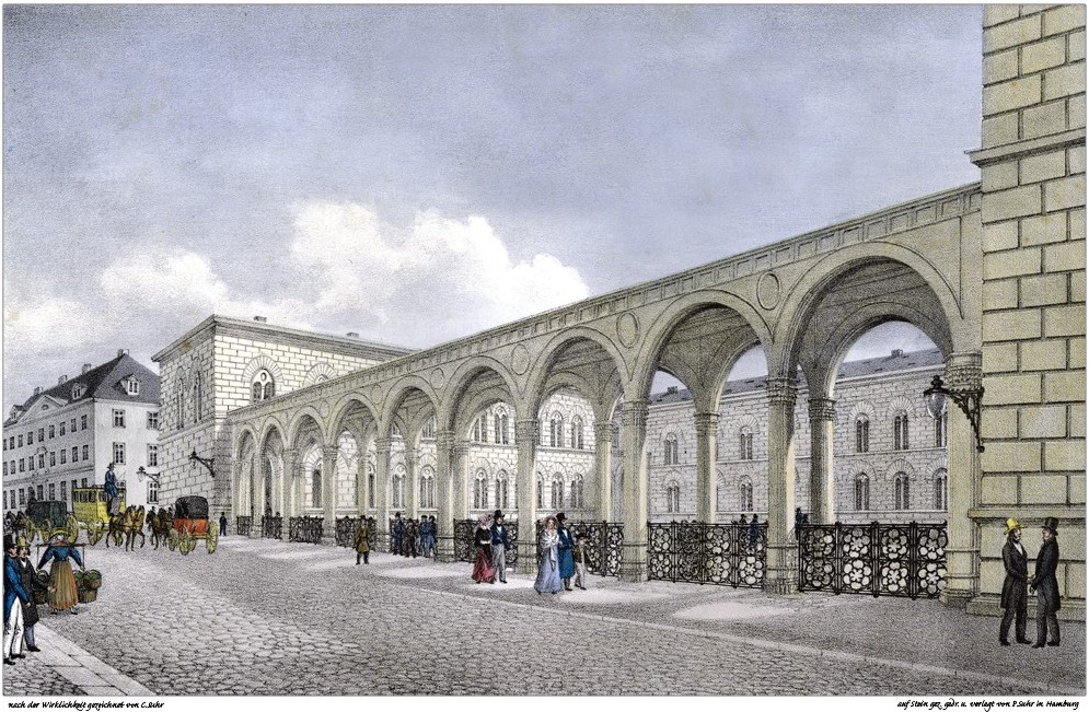 Johanneum 1840. Der Neubau von Johanneum, Akademischem Gymnasium und Stadtbibliothek am Domplatz / Speersort wurde 1840 bezogen. 1914 wurde das Johanneum nach Winterhude verlegt.